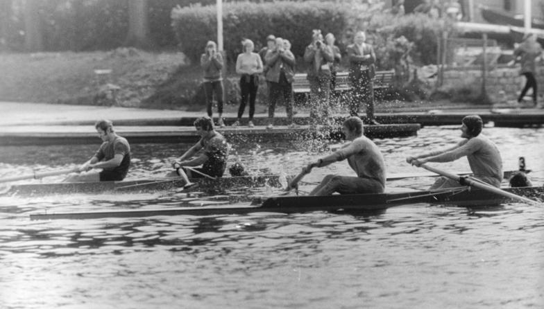 Gunkel, Lucke, Jährling, Ulrich ADN-ZB Mittelstädt 16.5.76 Berlin: Grünauer Frühjahrs-Ruderregatta- Harter Bord-an-Bord-Kampf im Zweier mit Steuermann wenige Meter vor dem Ziel. Die Olympiasieger und mehrfachen Weltmeister Wolfgang Gunkel-Jörg Lucke mit Steuermann Uwe Porombka (SC Berlin-Grünau-Boot im Vordergrund-vlnr) unterlagen überraschend gegen Harald Jährling-Fr.-Wilhelm Ulrich-Stm. Georg Spohr (SC Magdeburg-links im Foto).